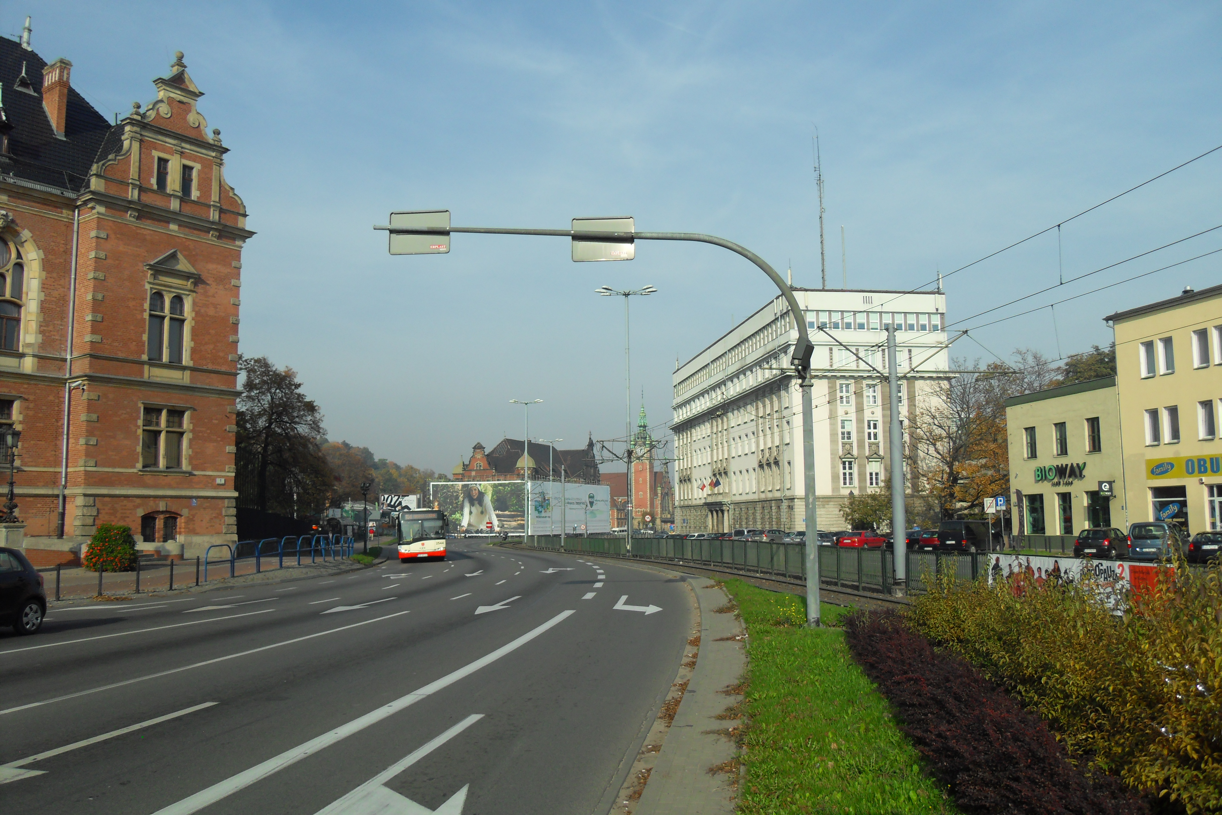 Gdańsk Śródmieście, ul. Wały Jagiellońskie (część północna).